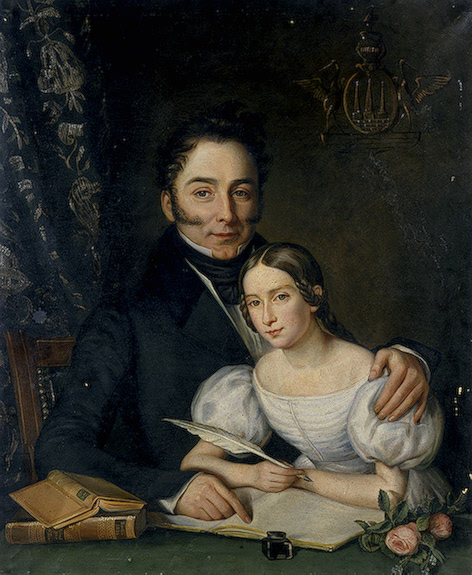 Александр Иванович Рибопьер (1781-1865) с младшей дочерью Татьяной (1829-1879).